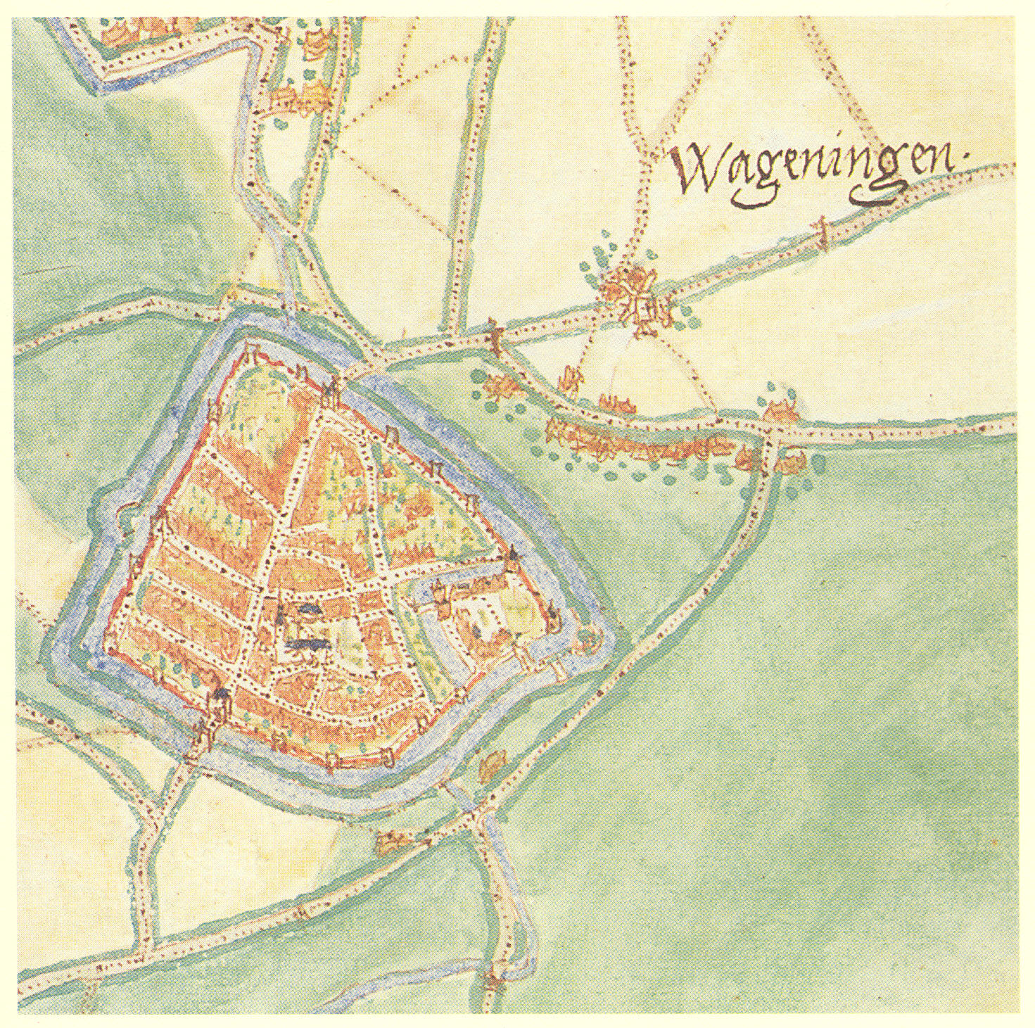 Net tekening van Jacob van Deventer van de stad Wageningen